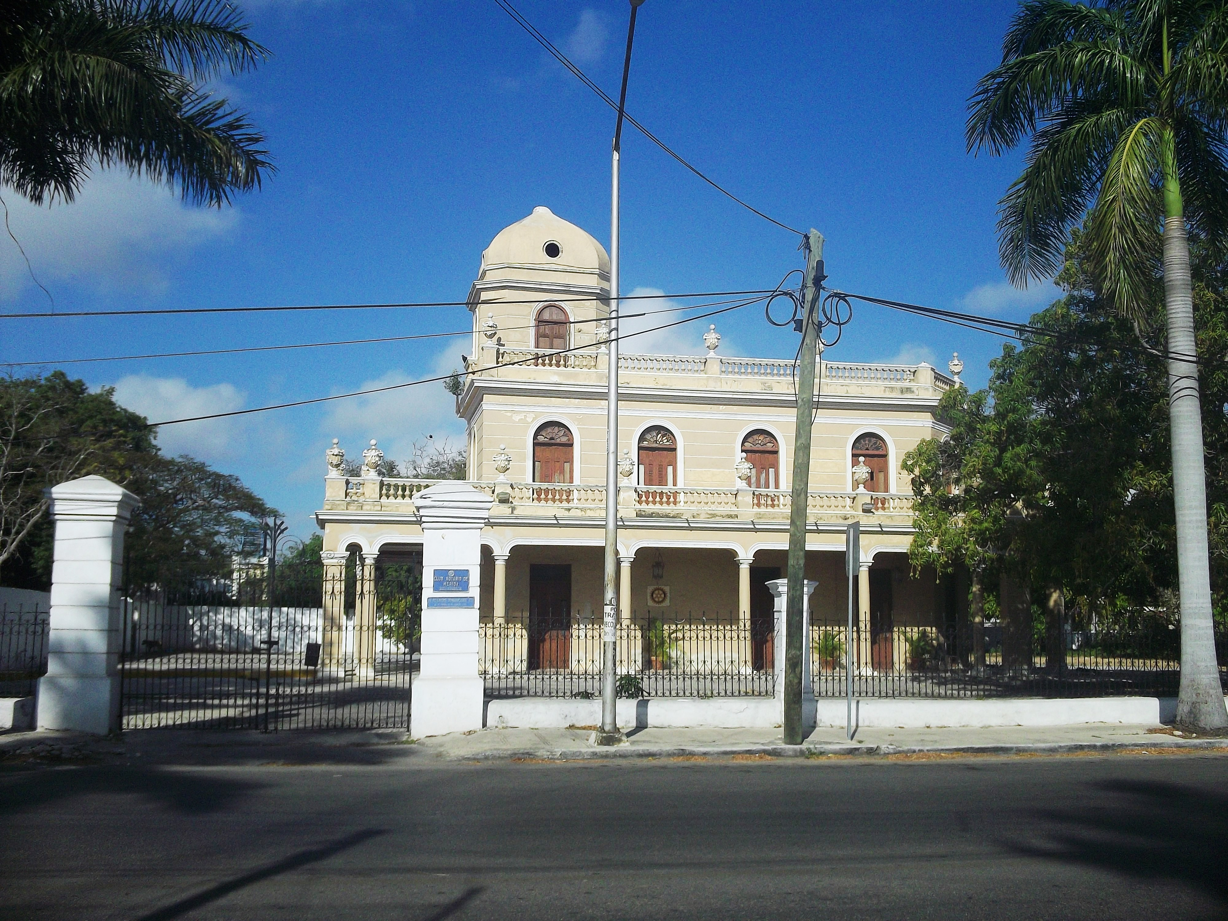 Casa de la Amistad, Mérida, Yucatán.